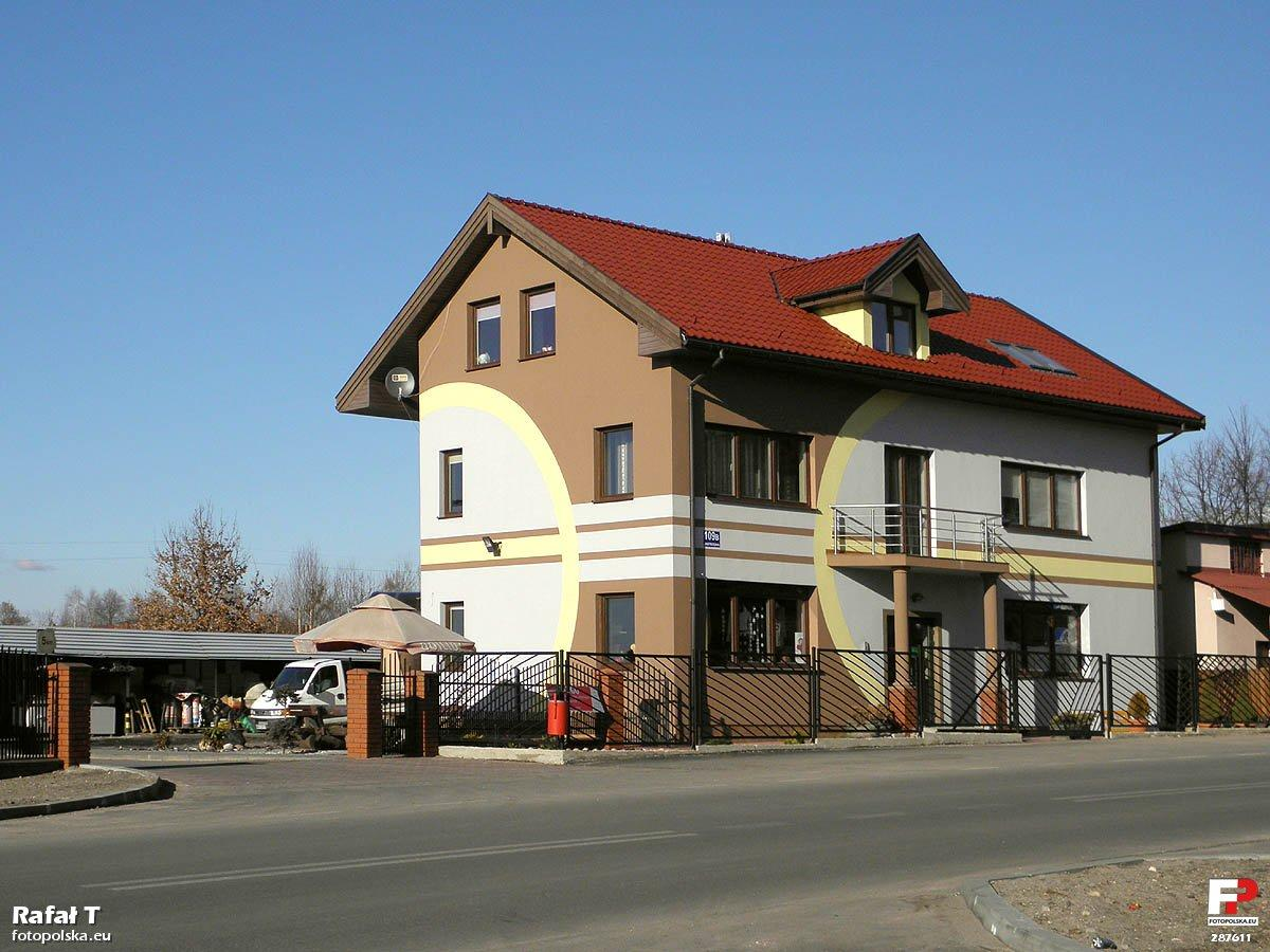 Jastrzębia 109b